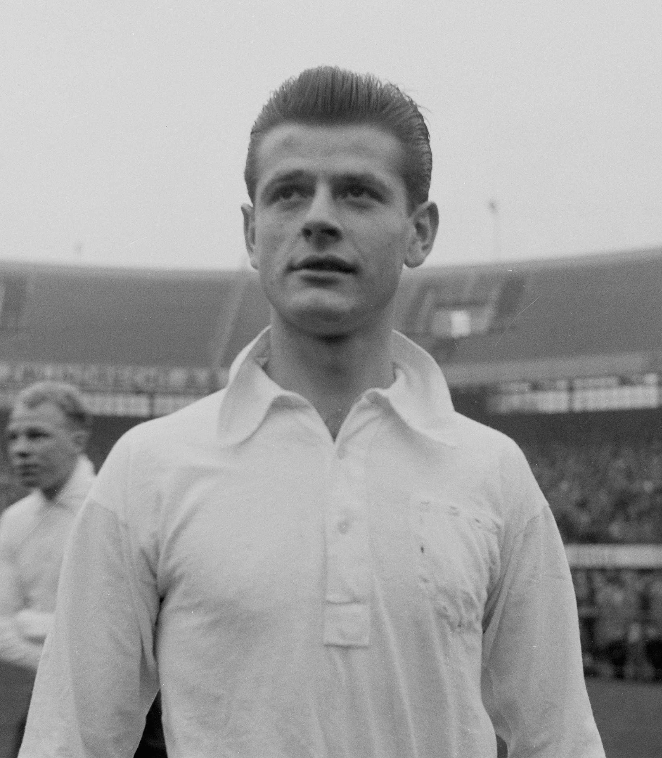 Debutanten Nederlands elftal, Jan Notermans (Fortuna '54)